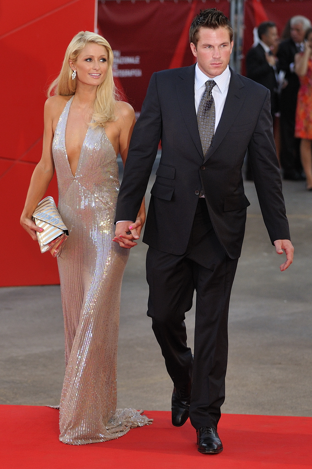 66ème Festival du Cinéma de Venise (Mostra), 3ème jour (04/09/2009) Paris Hilton et Doug Reinhardt lors du Tapis Rouge avec Nicolas Cage, Eva Mendes et le réalisateur Werner Herzog pour le film : Bad Lieutenant : Port of Call New Orleans